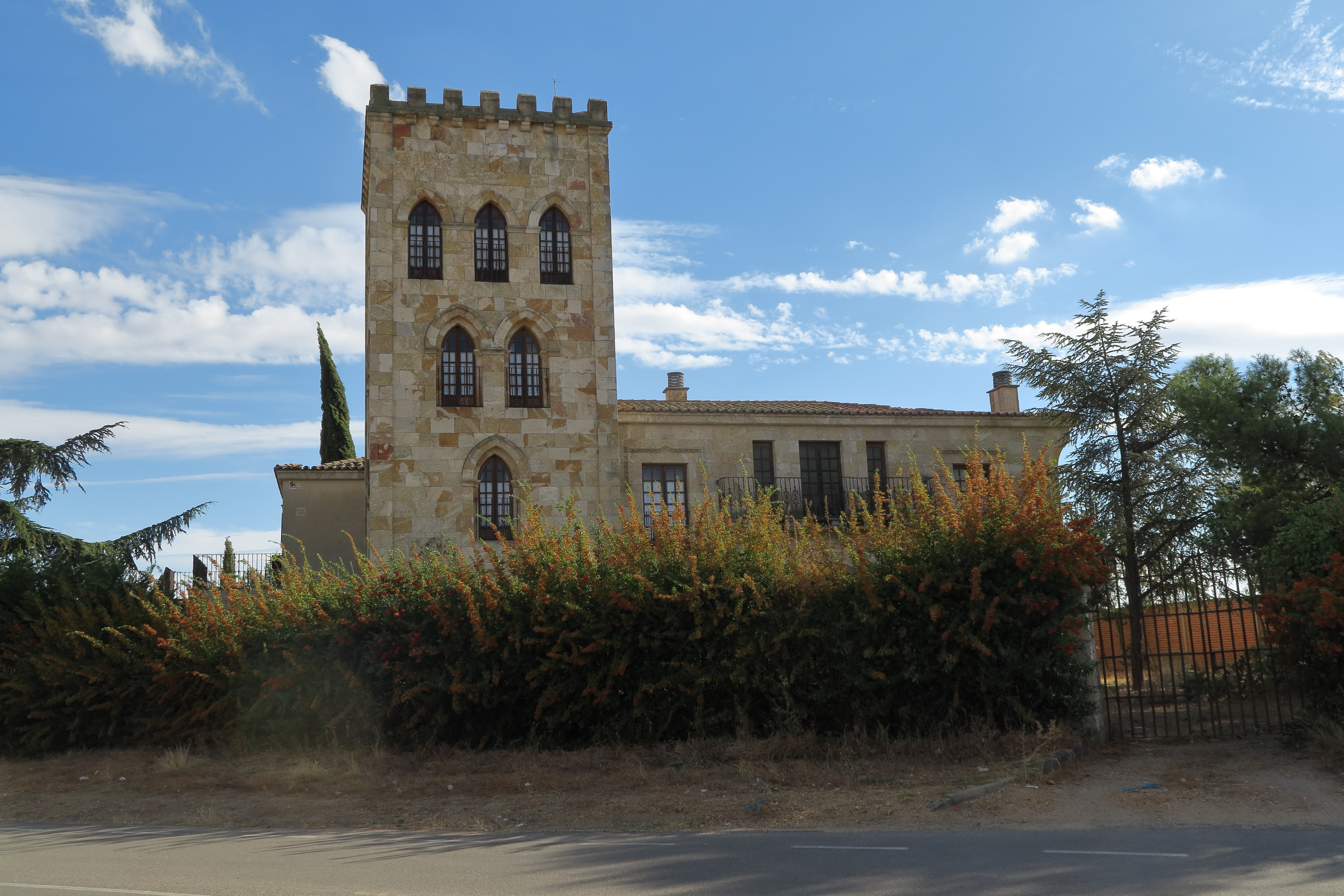 Pajares de la Lampreana, castillo de Pajares (s.XX)